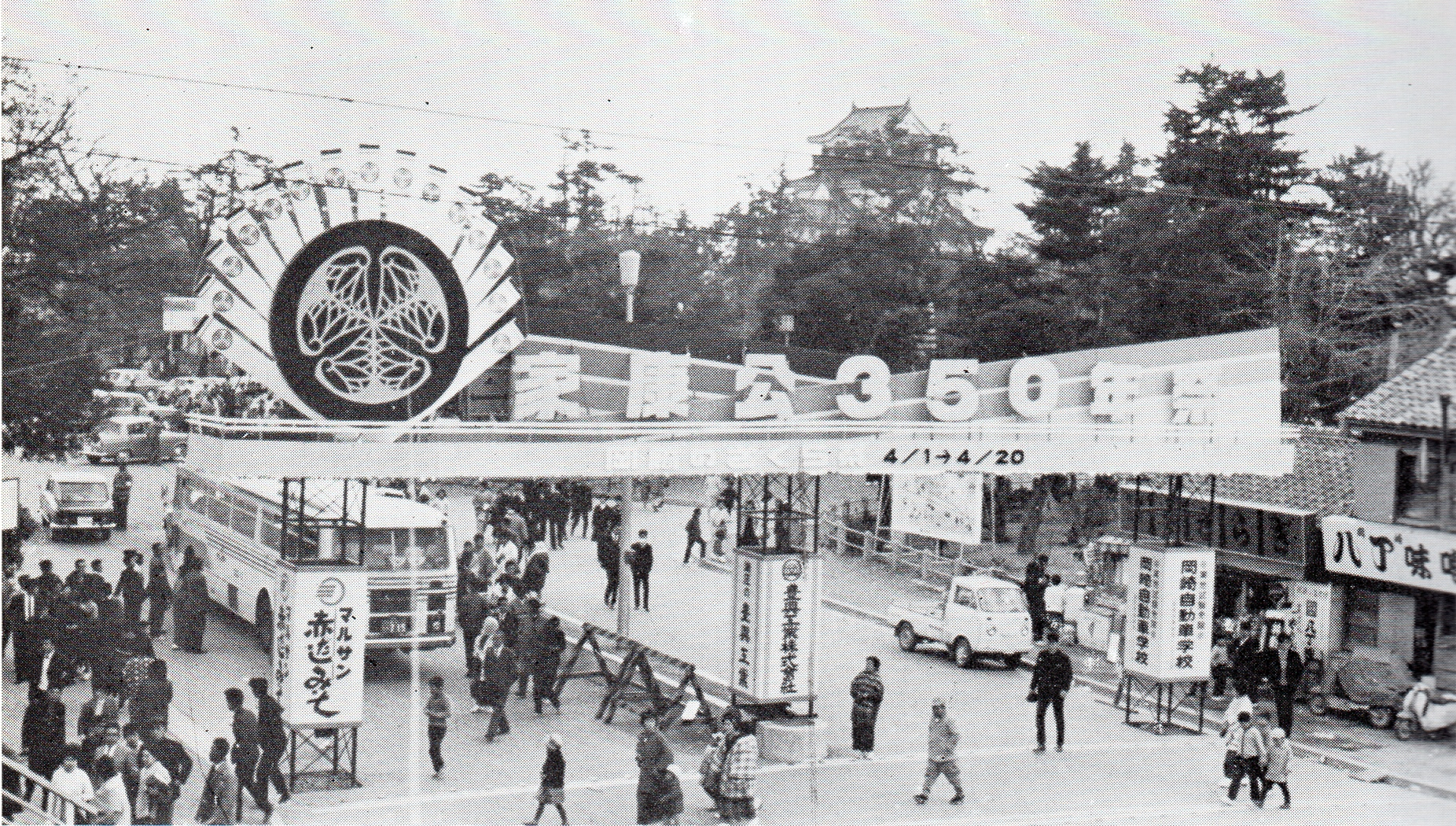 1965年4月1日～20日に岡崎市で開催された「家康公350年祭」。